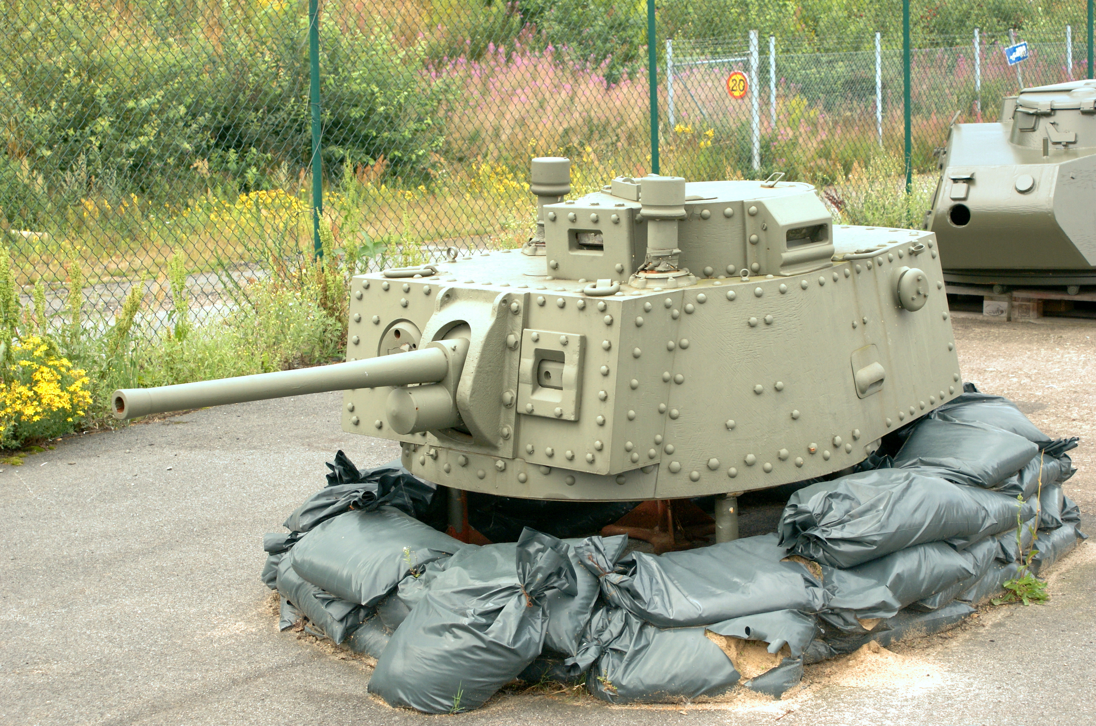 Turm eines Stridsvagn m/41 SI (Lizenzbau des TNHP/P38(t) im Museum in Hässleholm am 31.Juli 2009